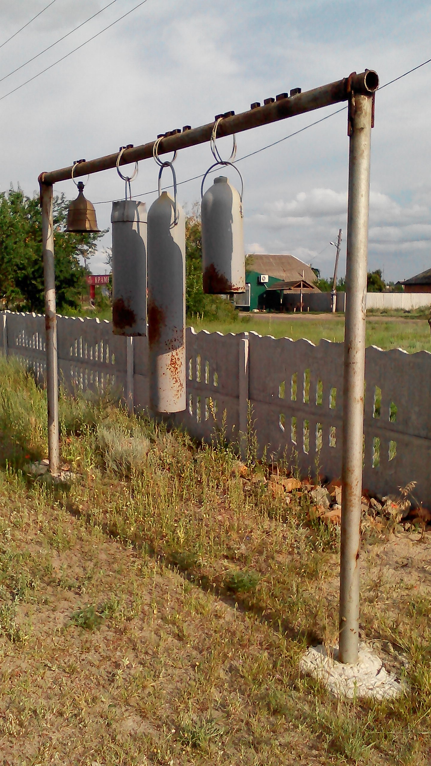 Україна, Харківська область, Зміївський район, село Чемужівка. Дзвони у дворі церкви Дмитра Солунського. 2018